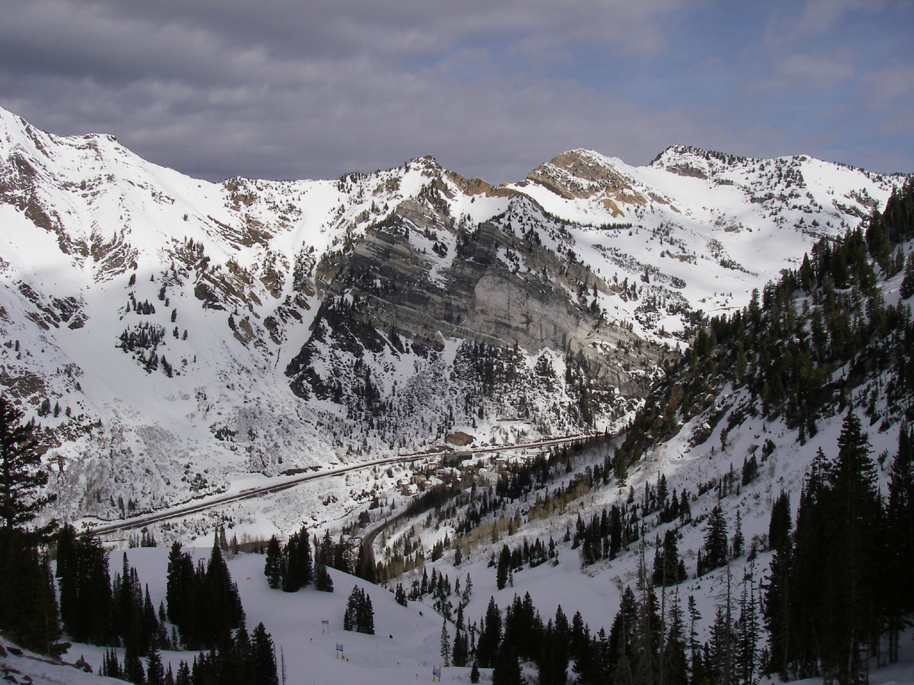 Alta